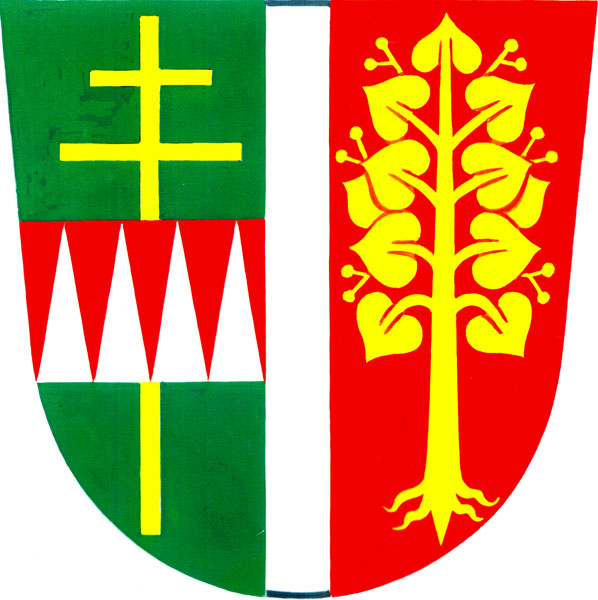 Znak obce Zlobice